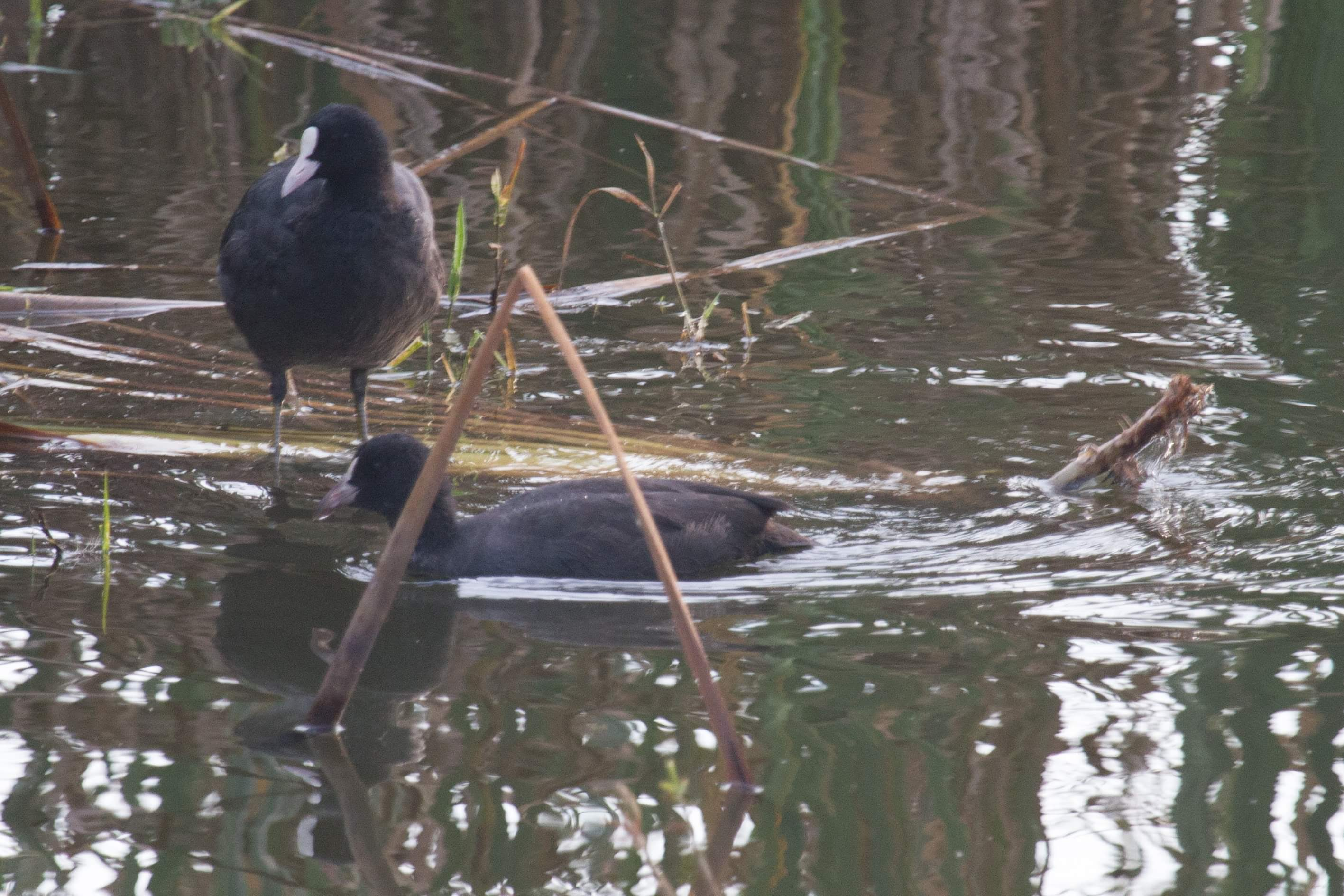 2 Lysky černé vyfocené na rybníce s rákosím